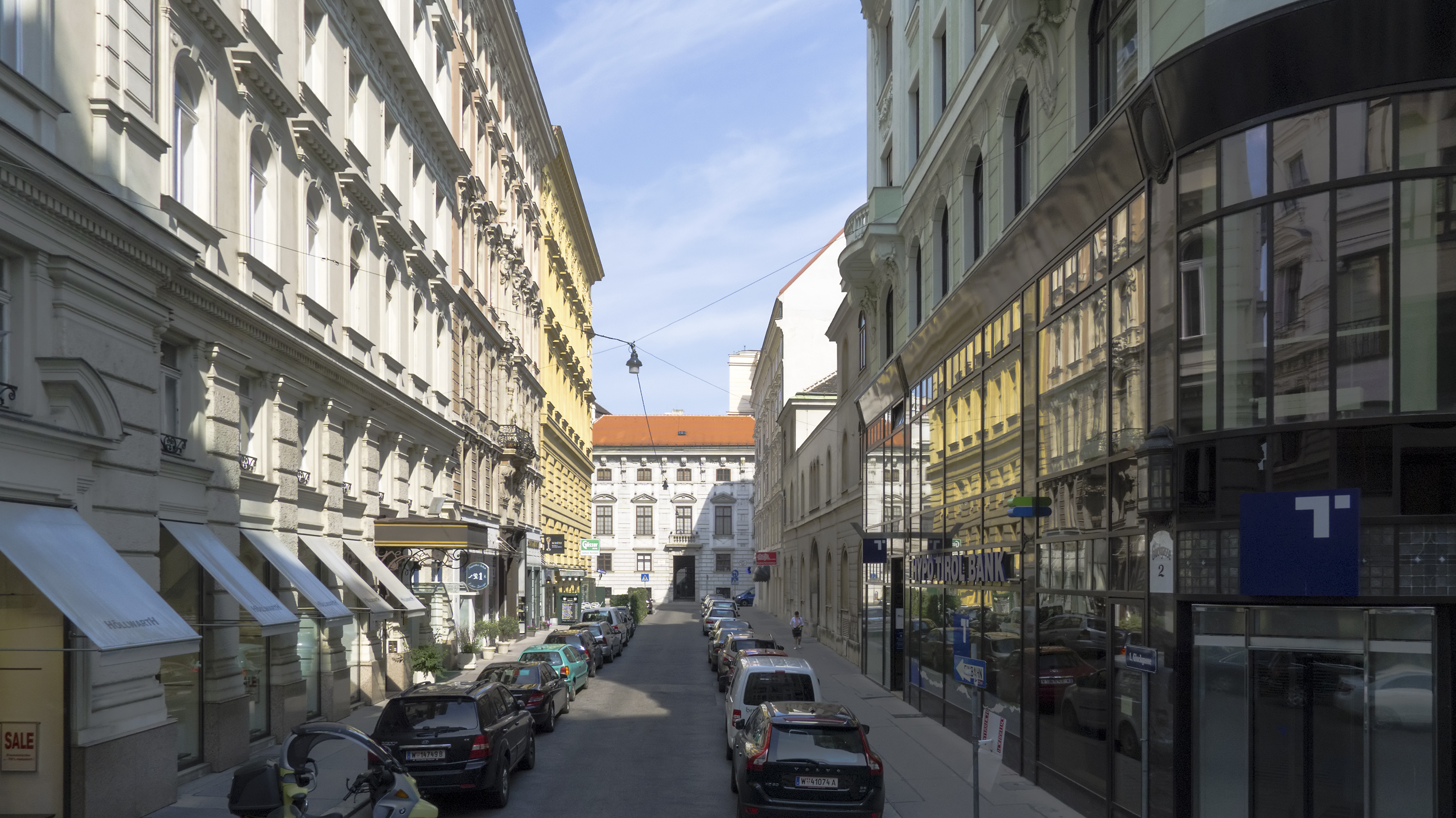 Gluckgasse in Wien 1 bei der Tegetthoffstraße Richtung Nordwesten